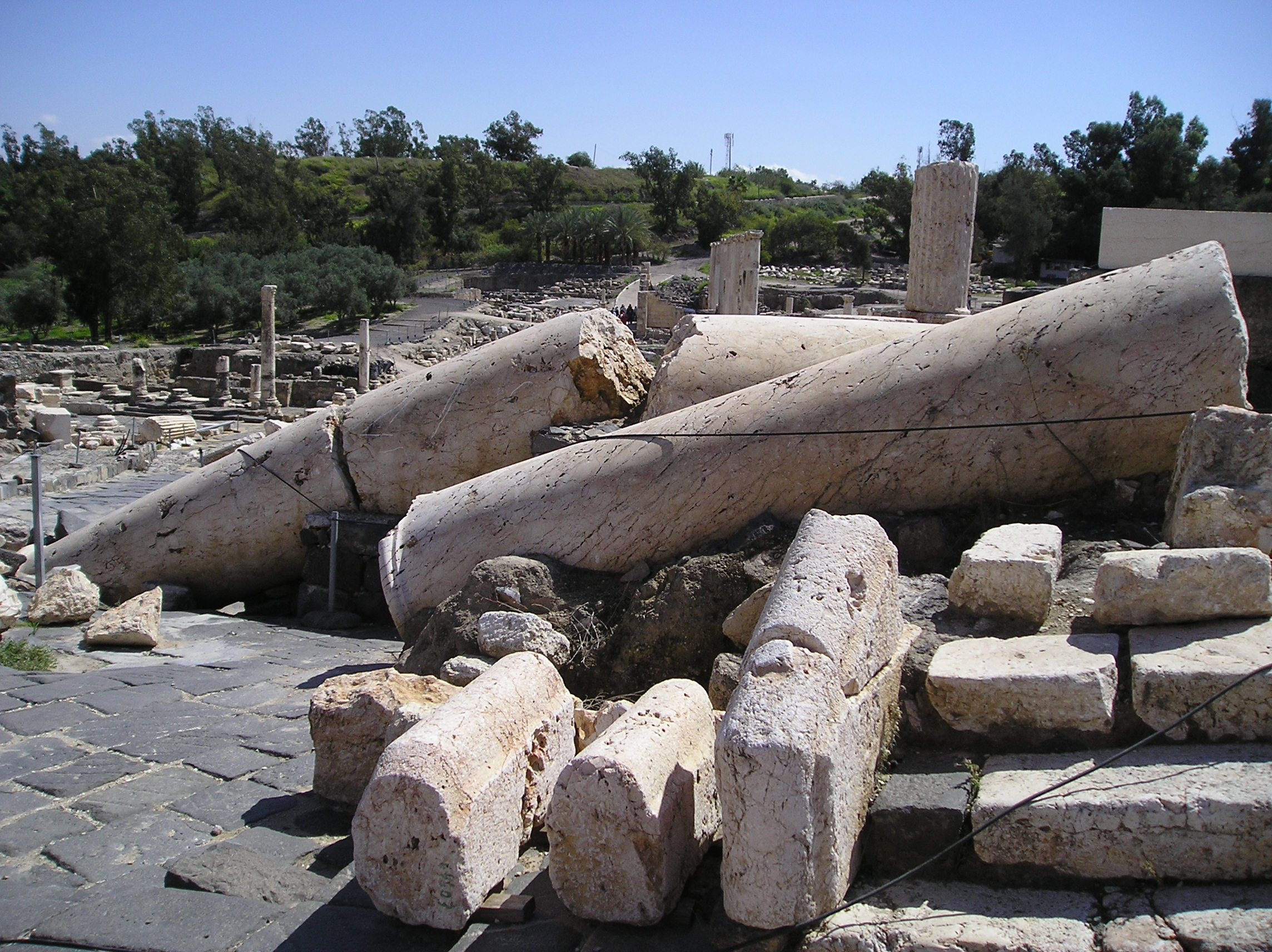 Bet Szean (stanowisko archeologiczne - Scytopolis) w Izraelu. Przewrócone kolumny rzymskiej świątyni - skutek trzęsienia ziemi w roku 749.